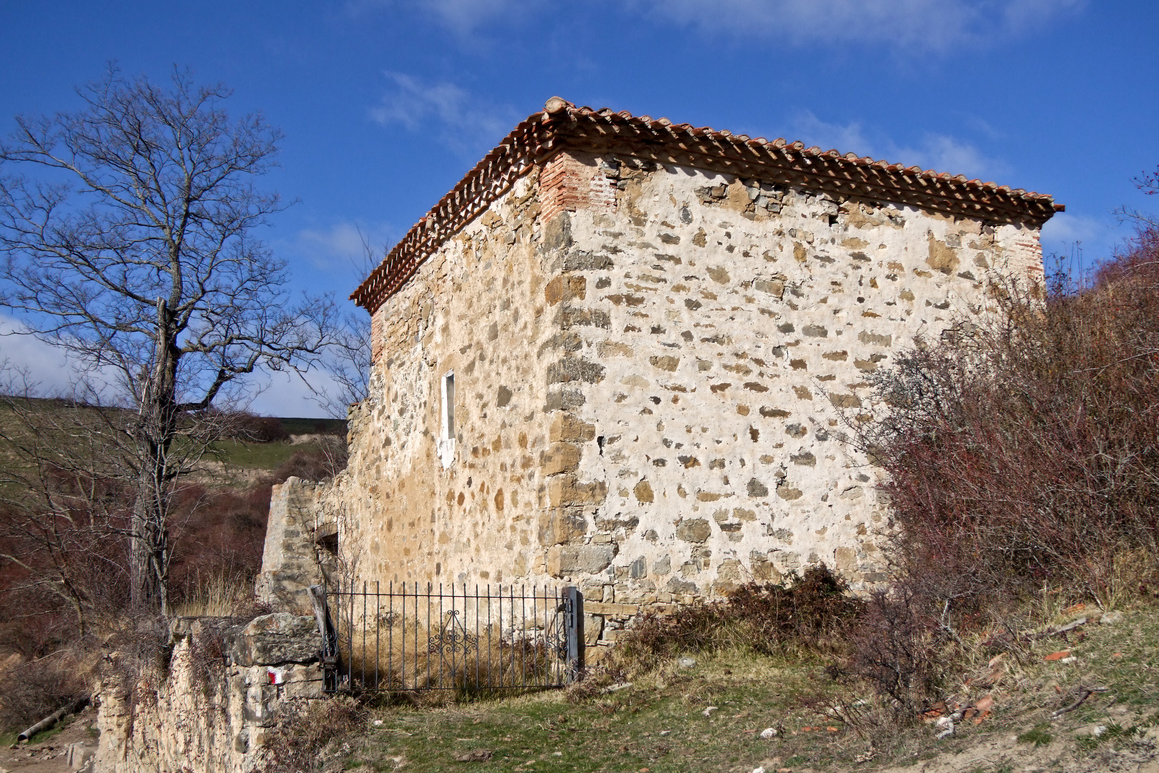 Ermita del Buen Suceso en la localidad de Torre en Cameros, La Rioja - España